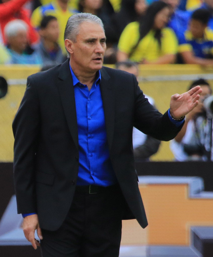 Quito 01 Sep (Andes).- Imágenes del encuentro entre Ecuador y Brasil por las eliminatorias al mundial Russia 2018. El resultado del encuentro terminó en 3 a 0 a favor del equipo garoto. Fotografías: Carlos Rodríguez/Andes.